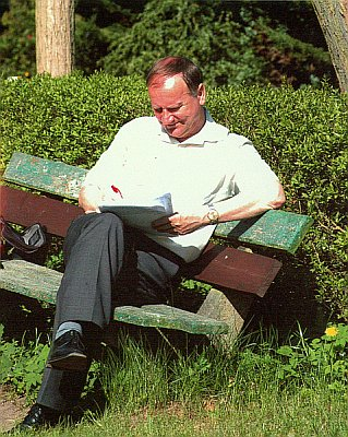 Wiesław Józef Kowalski (ur. 18 września 1945 r. w Płocku) - polski działacz kulturalny.